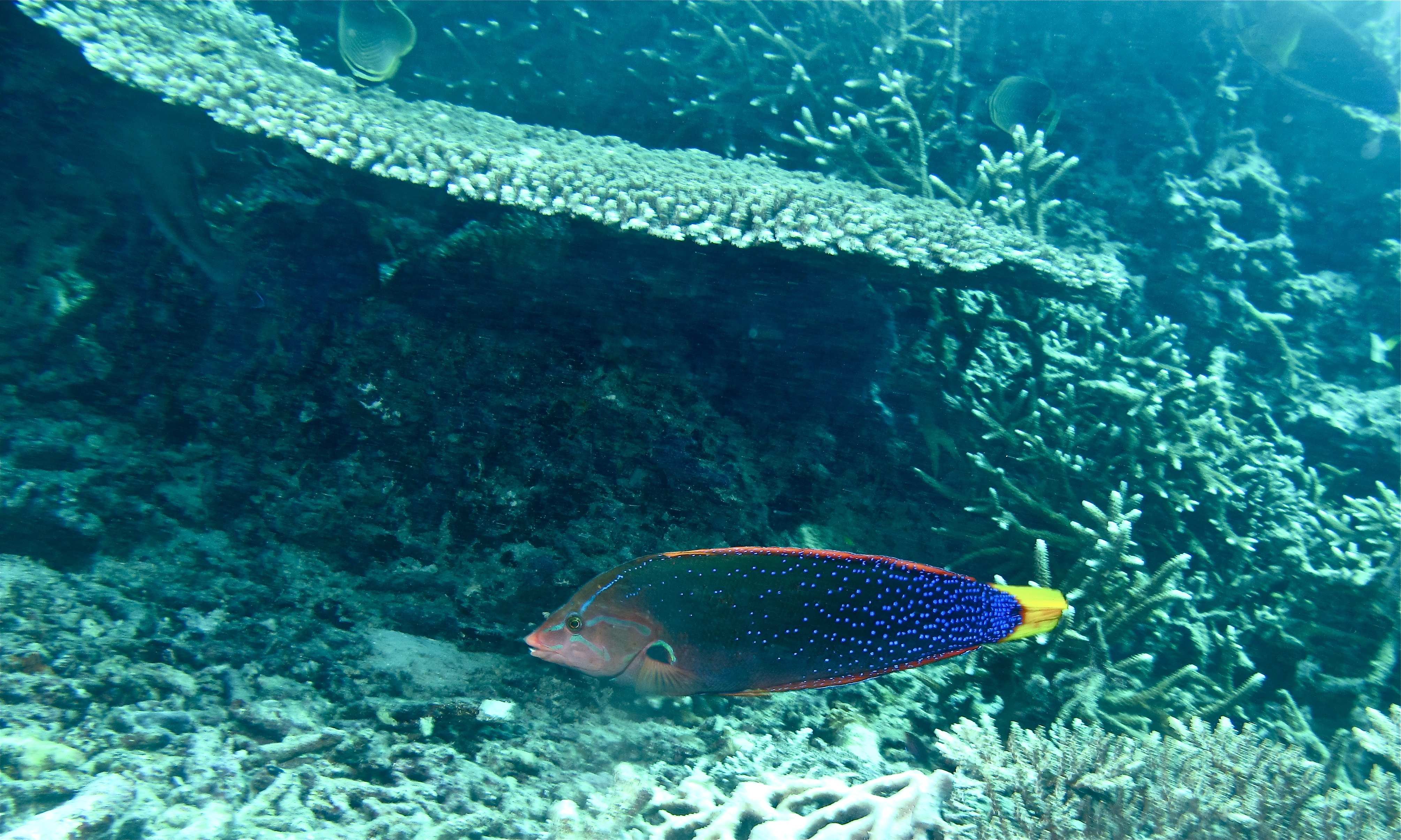 South Point, Pulau Sipadan, Sabah, MALAYSIA